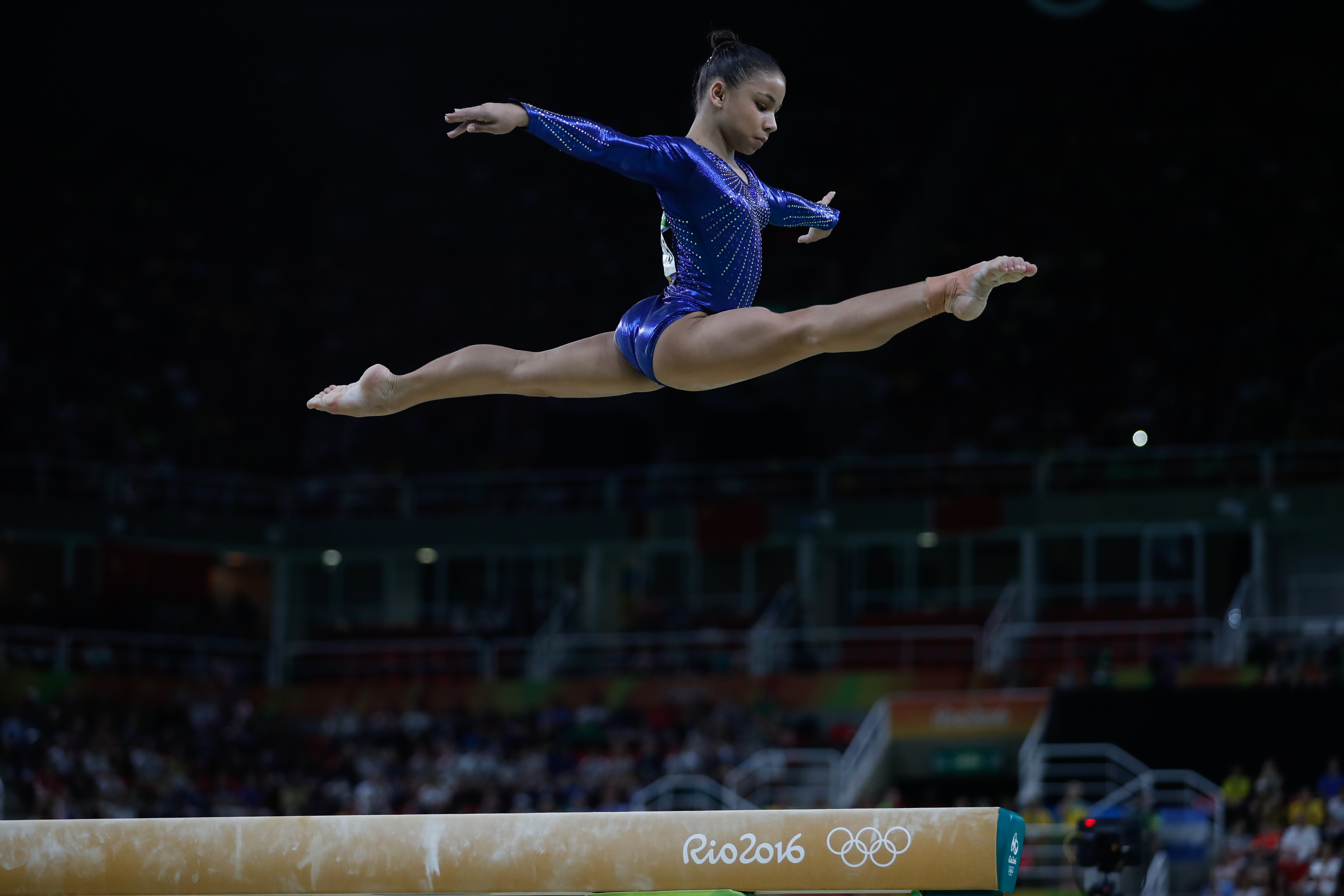 Rio de Janeiro - Flávia Saraiva durante final por equipes da ginástica artística feminina nos Jogos Olímpicos Rio 2016, em que o Brasil terminou em 8º lugar. (Fernando Frazão/Agência Brasil)